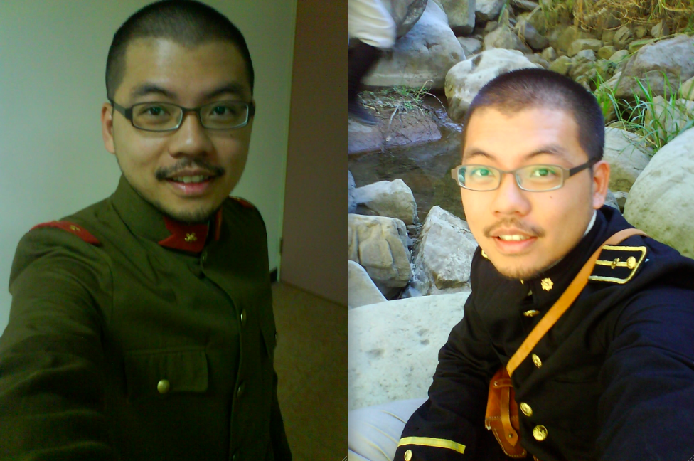 王鐘銘在電影《賽德克·巴萊》擔任臨時演員。左為大日本帝國陸軍制服照片，右為大日本帝國警察制服照片。